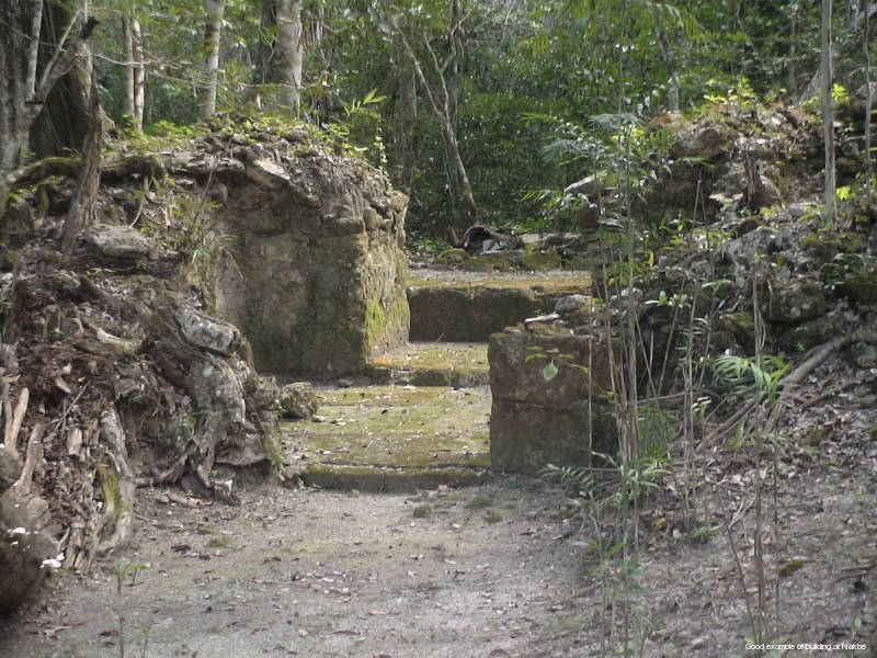 Palacio pre Clasico en nakbe, 2006 Authenticmaya